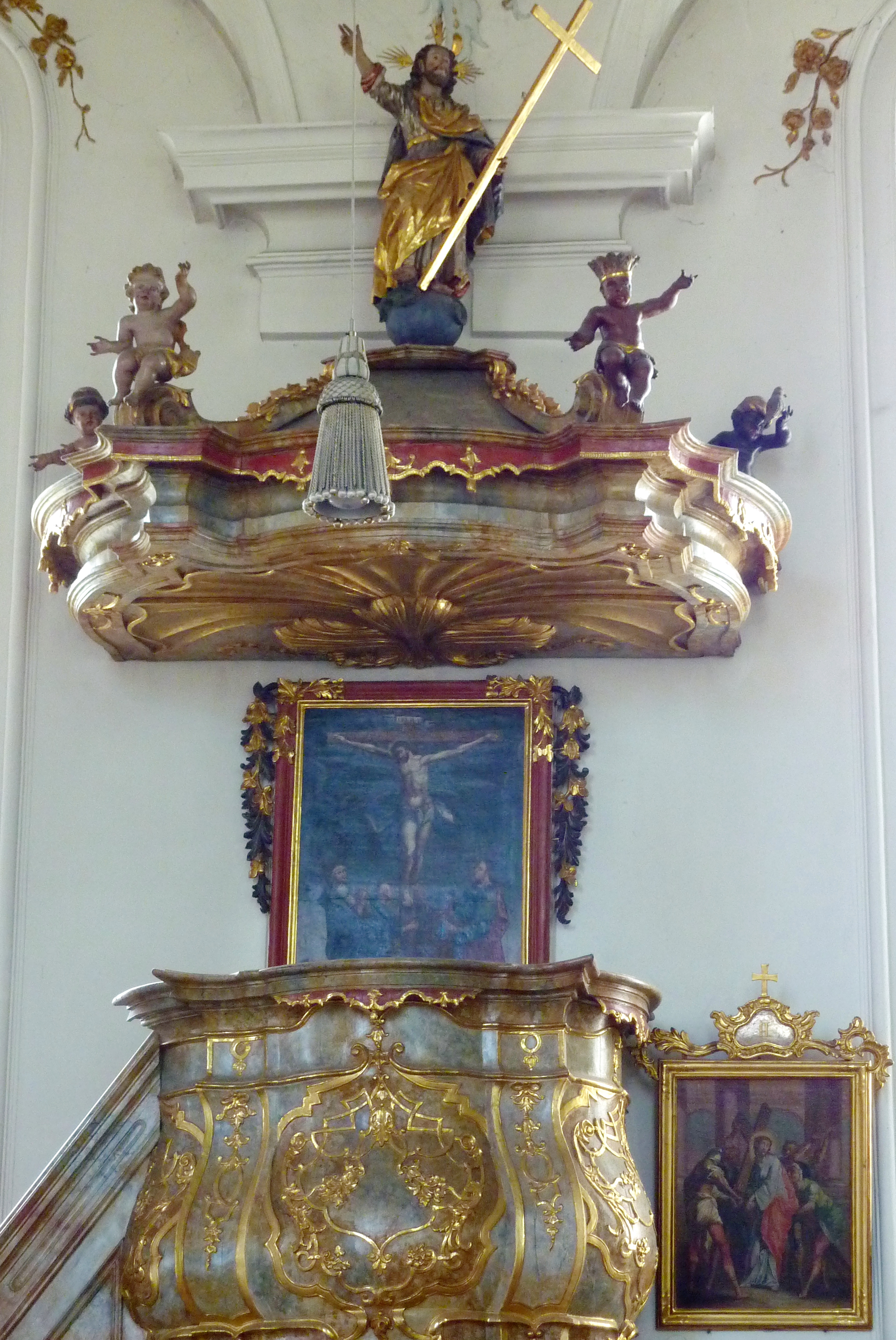 Katholische Pfarr- und Wallfahrtskirche Mariä Heimsuchung in Gottmannshofen, einem Stadtteil von Wertingen im Landkreis Dillingen an der Donau (Bayern), Kanzel von Elias Amann von 1737, mit vier sitzenden Putten, die die vier Erdteile Asien, Europa, Amerika und Afrika symbolisieren, auf dem Schalldeckel die Figur des Salvator Mundi (Retter der Welt) von Joseph Mayr.